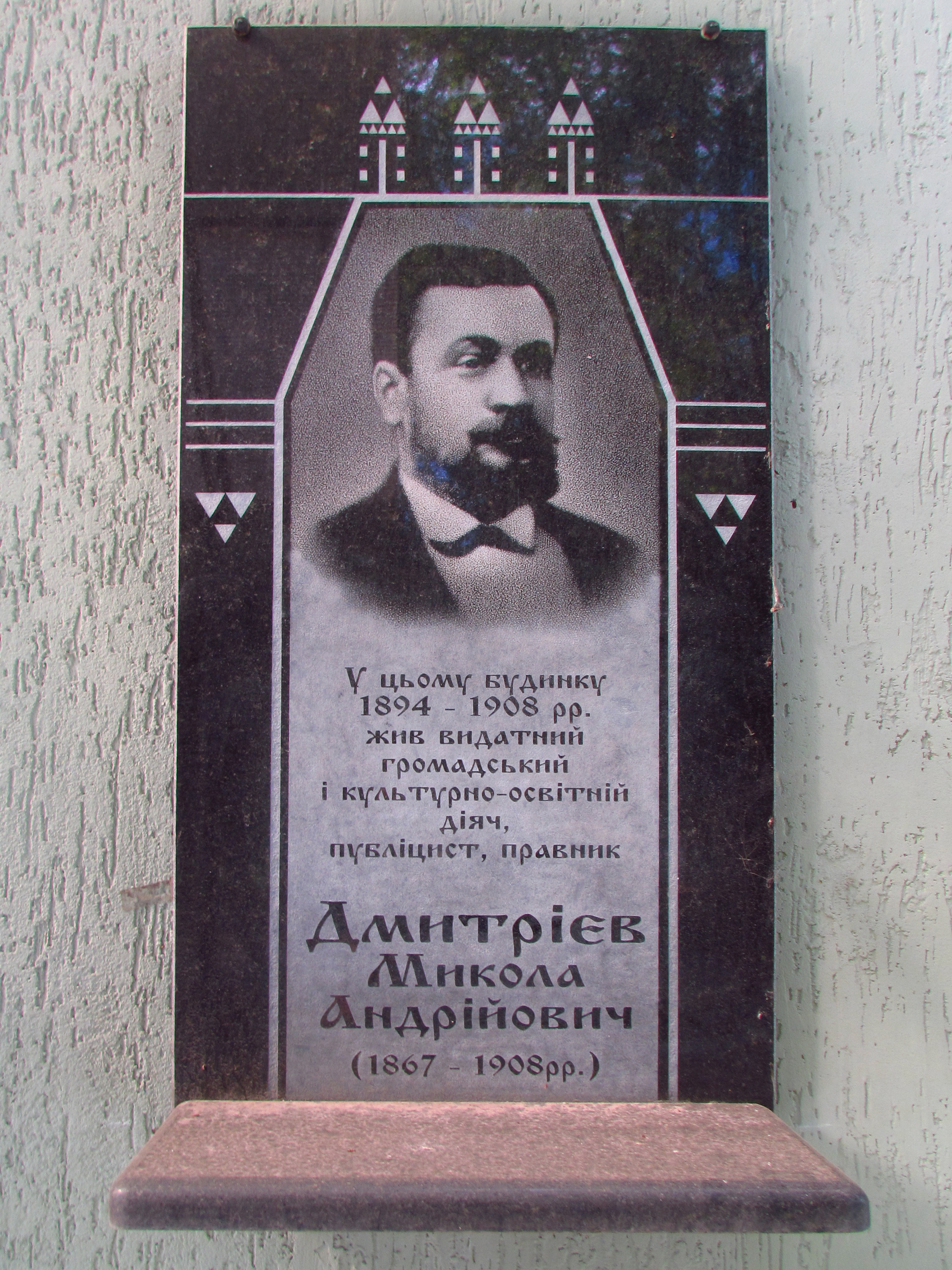 Полтава. Меморіальна дошка на честь громадського діяча та літератора М.А.Дмитрієва.